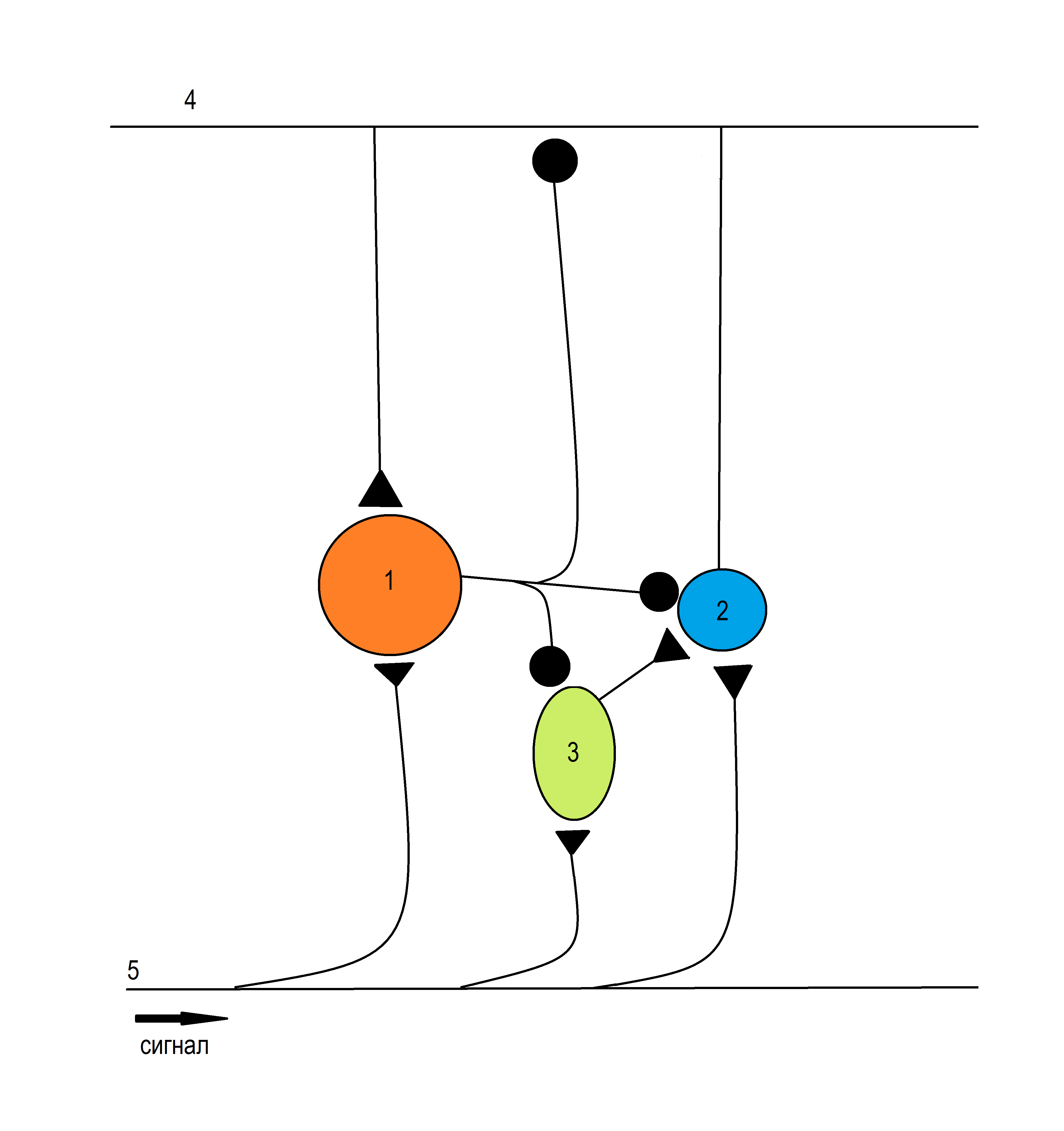 Эта схема даёт возможность лучше понять строение этой нейронной сети